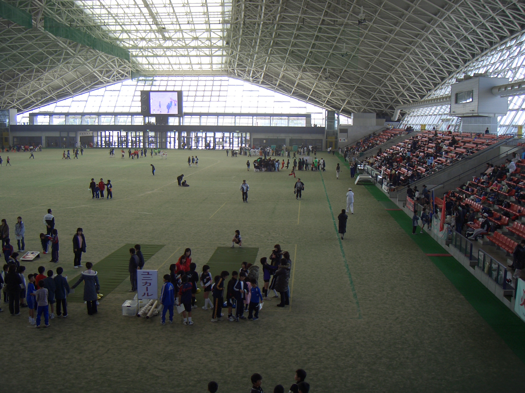 四日市ドーム内部の様子